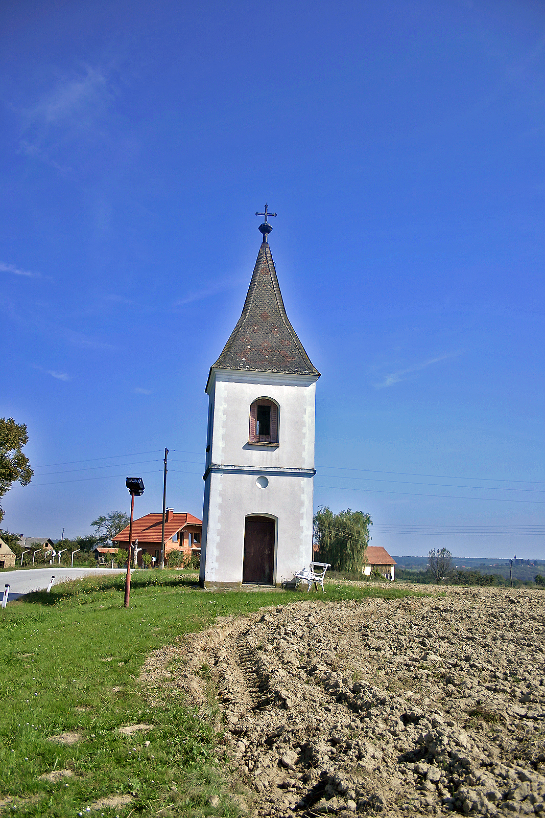 Zvonik v Budincih Preprosto oblikovan nadstropni zidani vaški zvonik iz prve polovice 20. stoletja pokriva opečna štirikapnica. Zvonik stoji ob cesti v jugovzhodnem delu naselja, nasproti pokopališča v bližini hiše Budinci 65. Vir: Register nepremične kulturne dediščine © Ministrstvo za kulturo